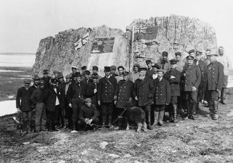 Le capitaine Joseph-Elzéar Bernier et son équipage à Winter Harbour, (N.W.T.) sur l'île Melville en 1908-09.